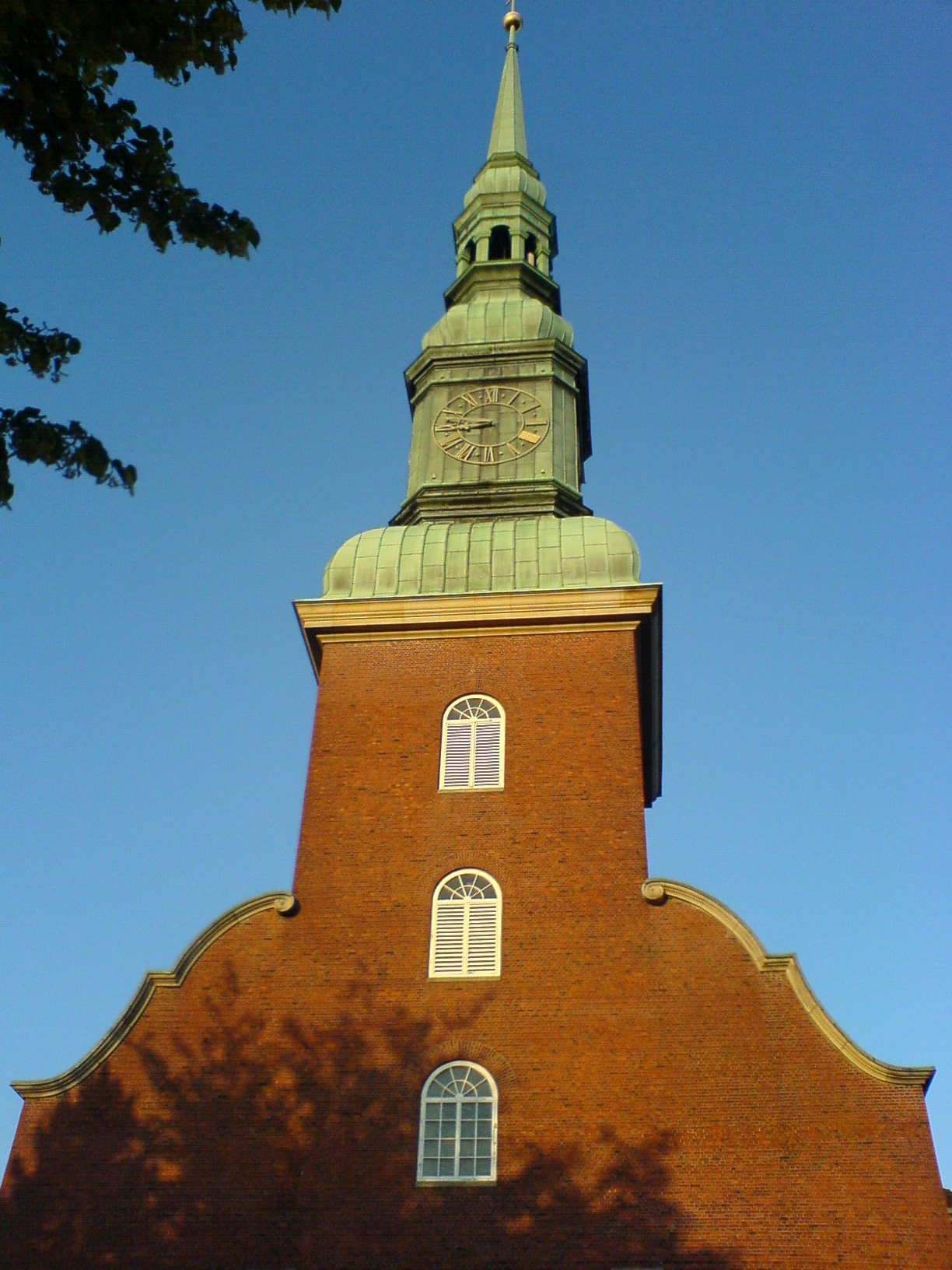 Bildbeschreibung